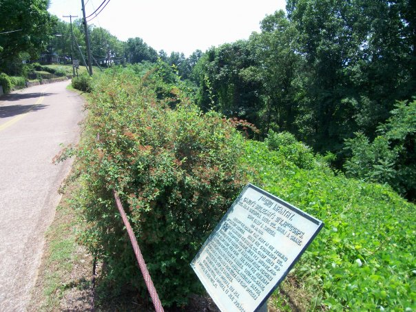 Gettysburg Battlefield